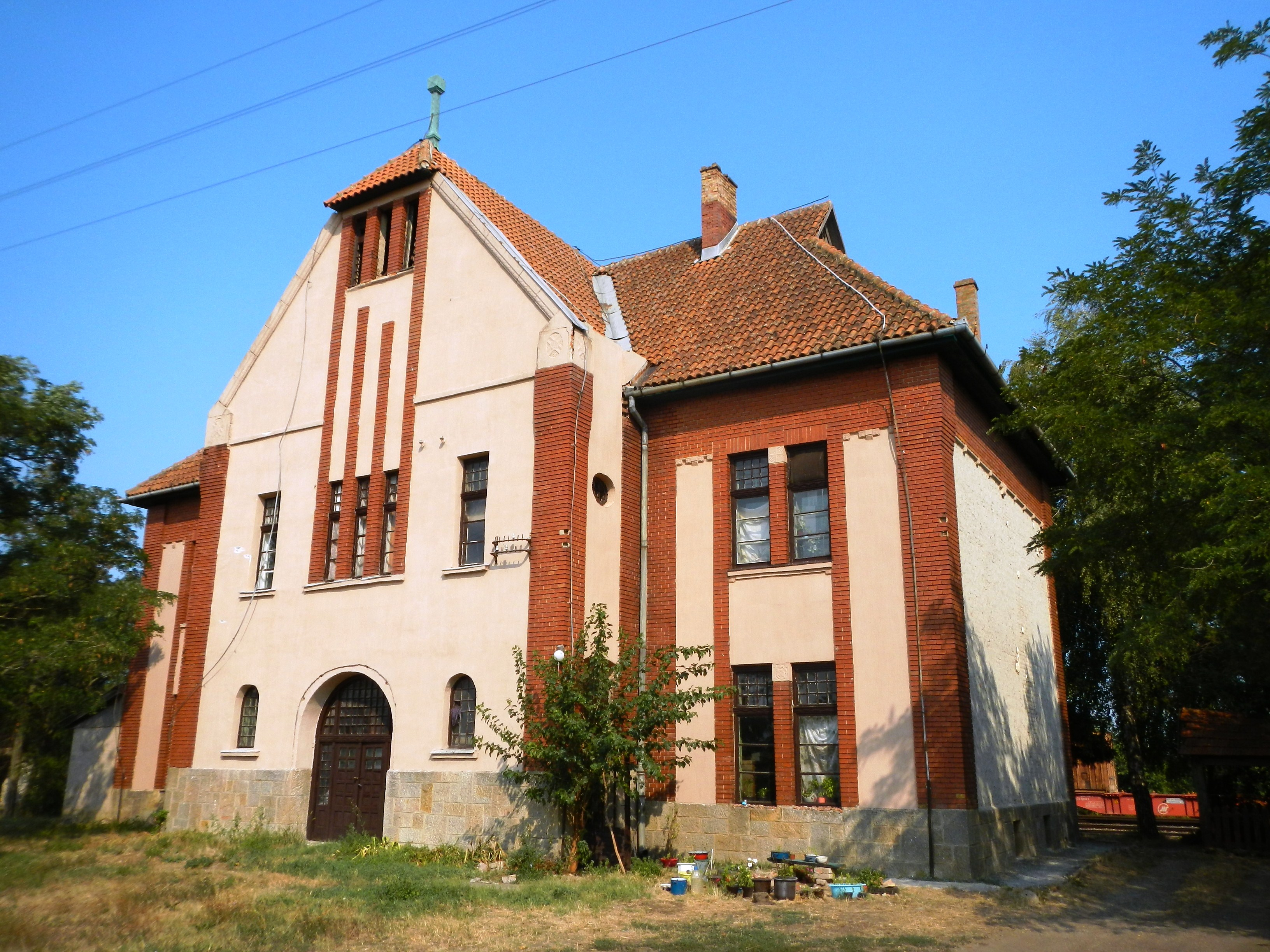 Западна фасада